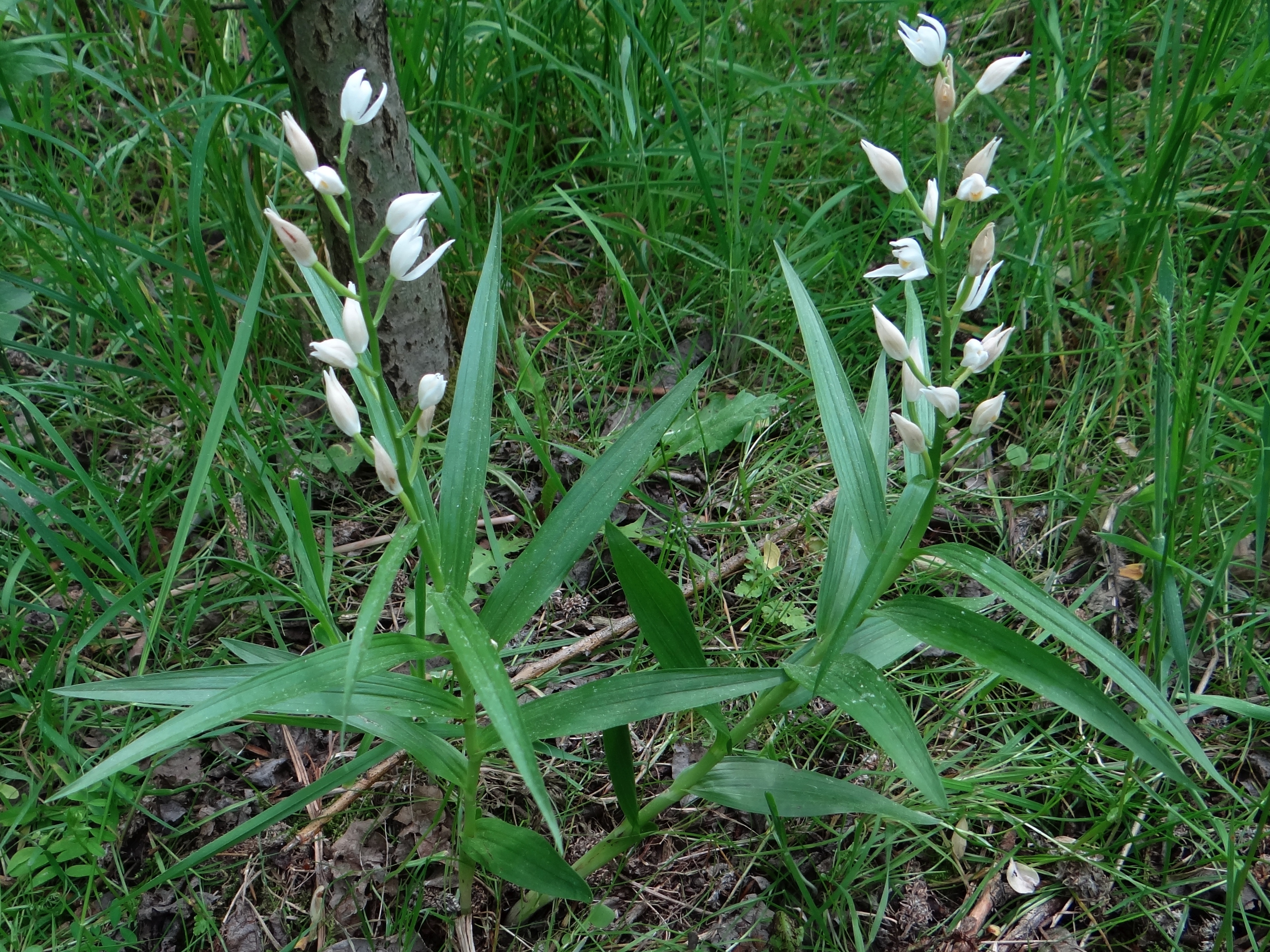 Cephalanthera longifolia (location: Poland, Pogórze Wiśnickie, Leszczyna)